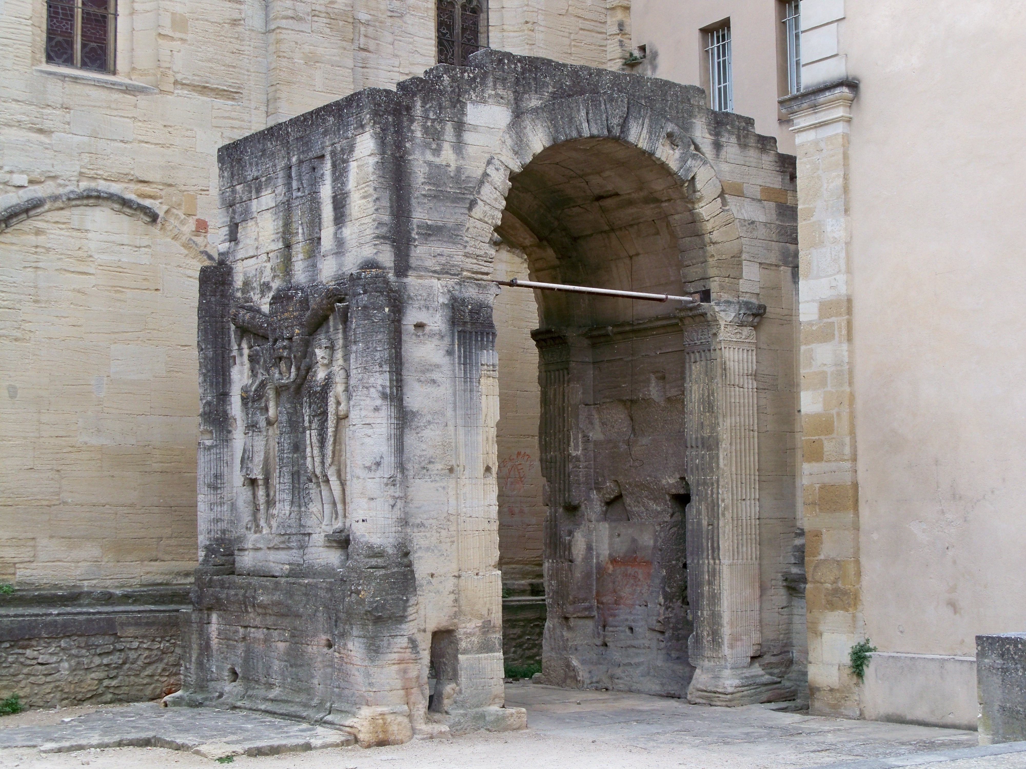 Arc Romain de Carprentras, Vaucluse, France